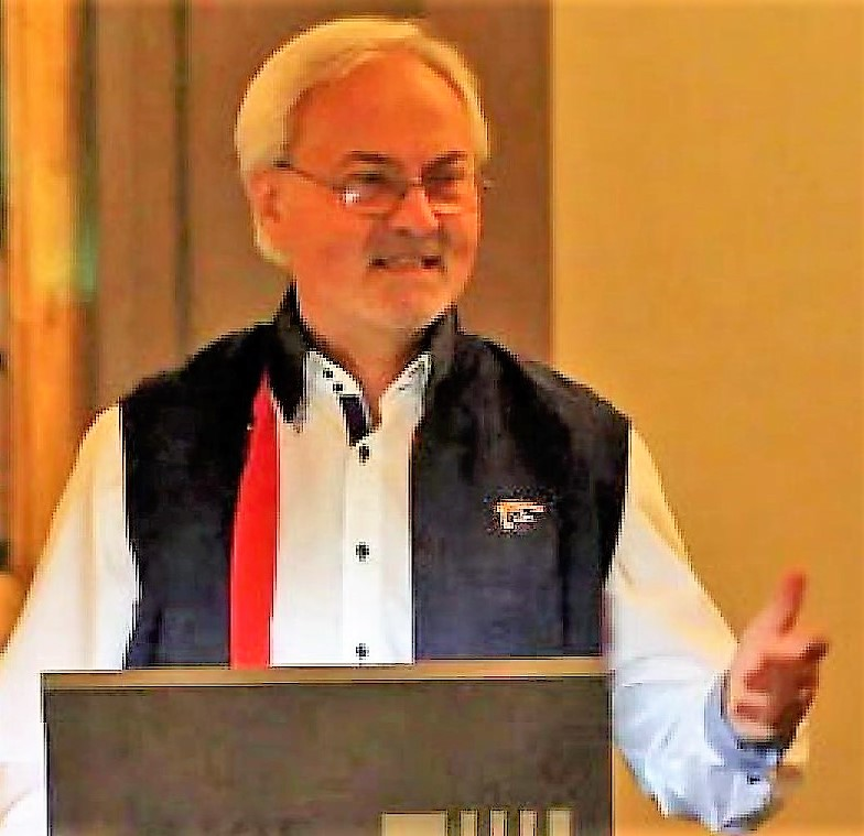 Ronny Kabus bei der Buchvorstellung im Lutherhaus Wittenberg am 16.10.2014